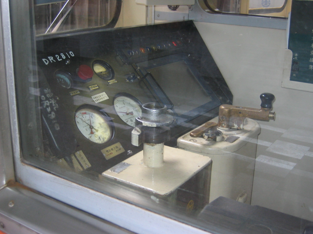 中文（台灣）: 臺灣鐵路管理局柴聯車DR2810駕駛室。